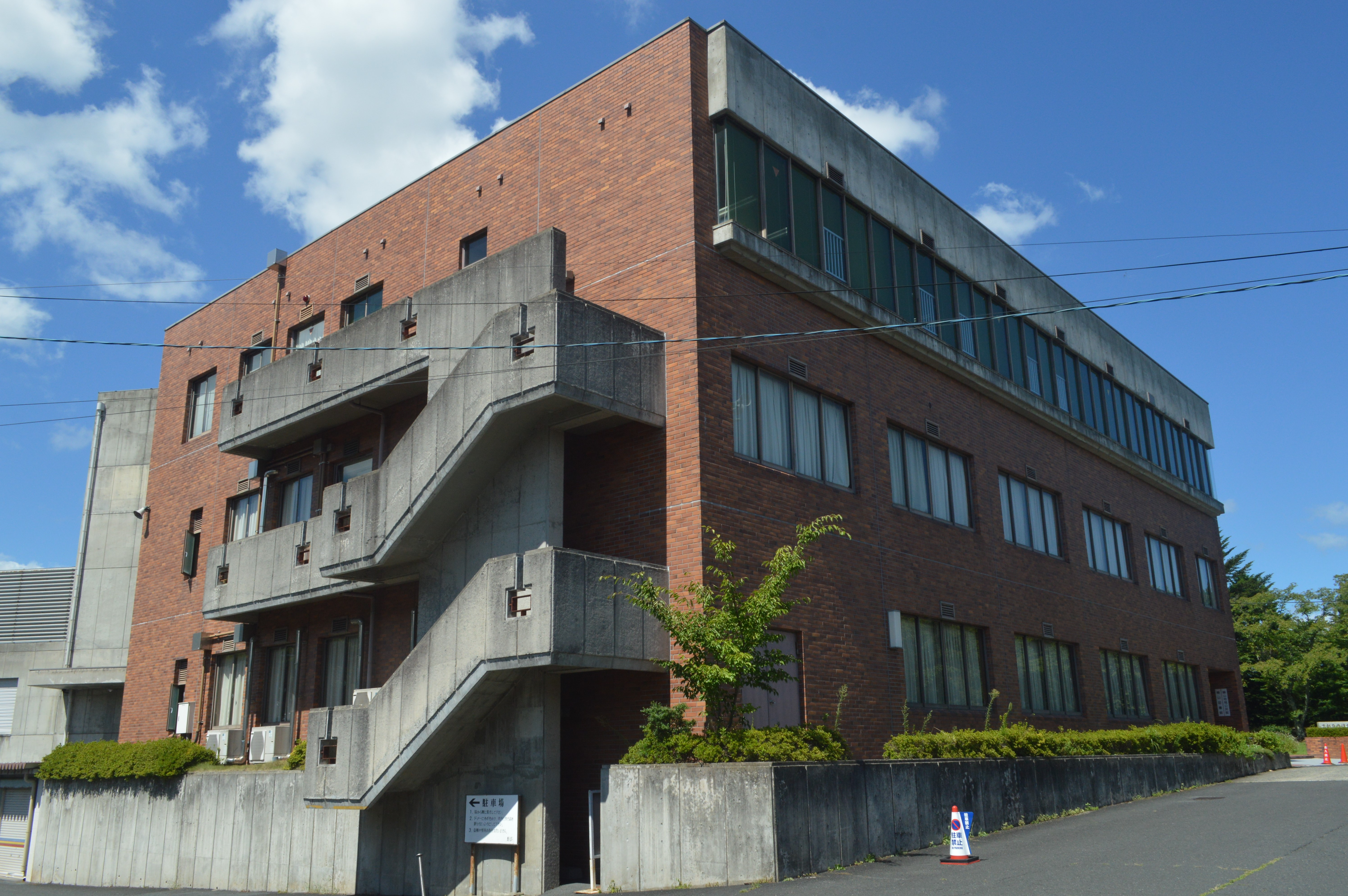 京都府京丹後市にある京都府丹後文化会館。京丹後市中央公民館、京丹後市立峰山図書館などが入っている。